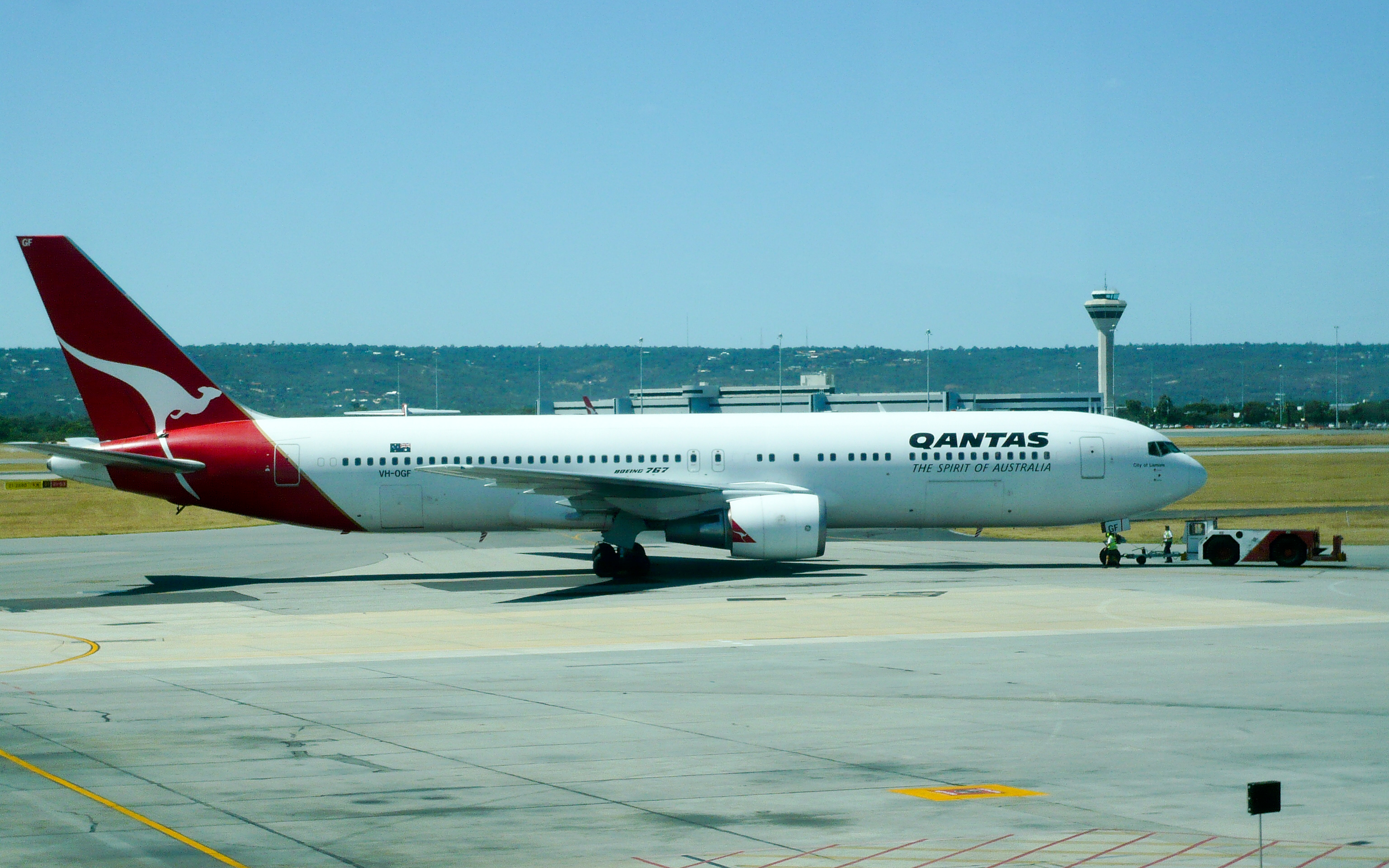 Qantas B767-300ER VH-OGF